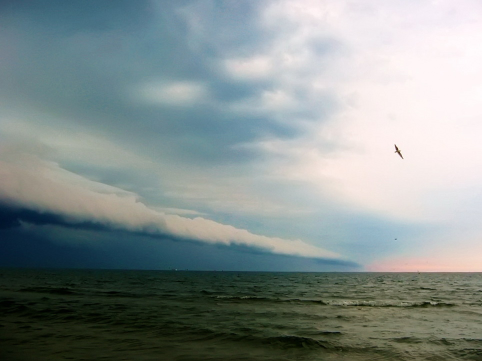 Front burzowy nad Bałtykiem